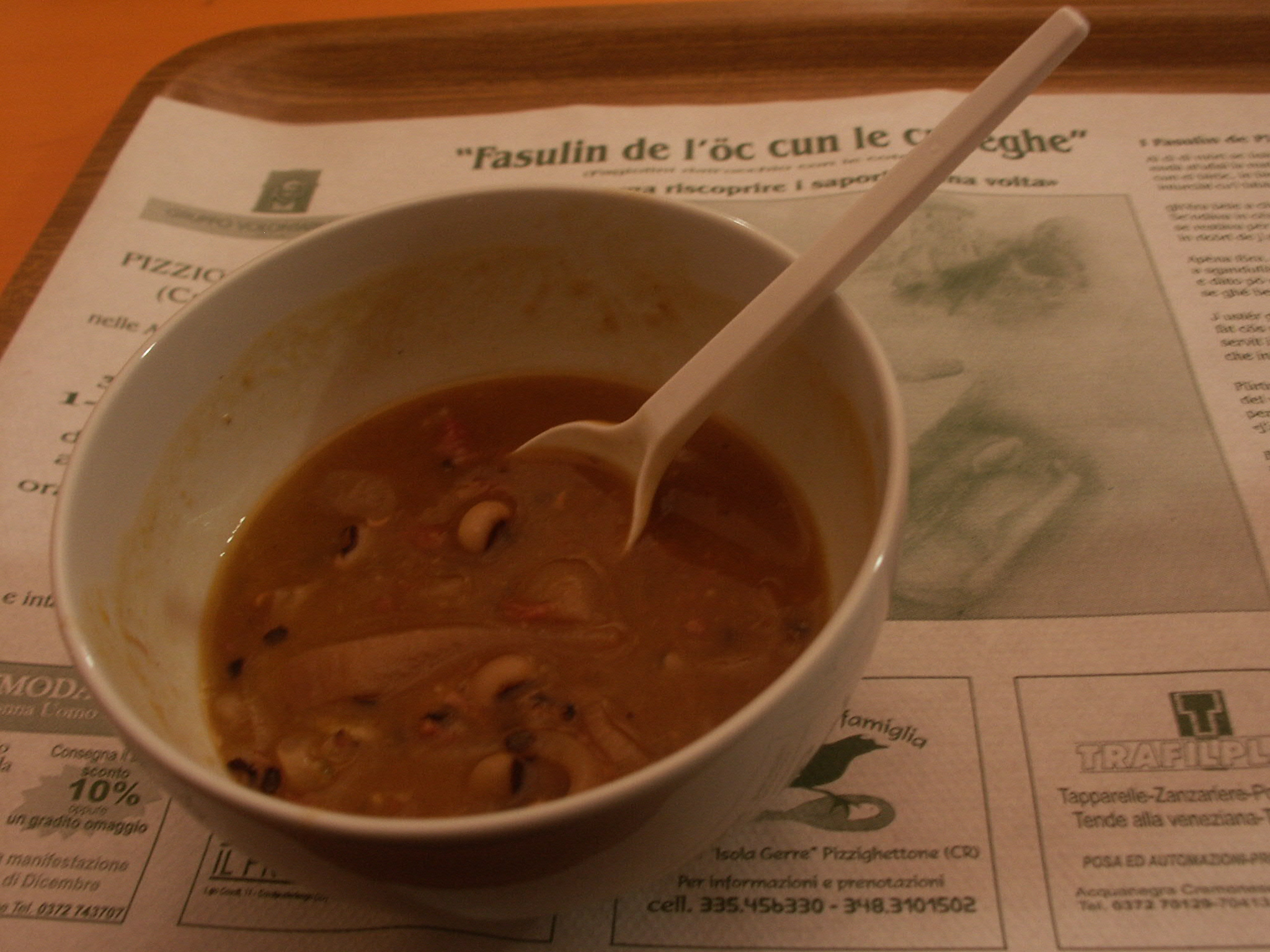 Fasulinde l'oec cun le cudeghe